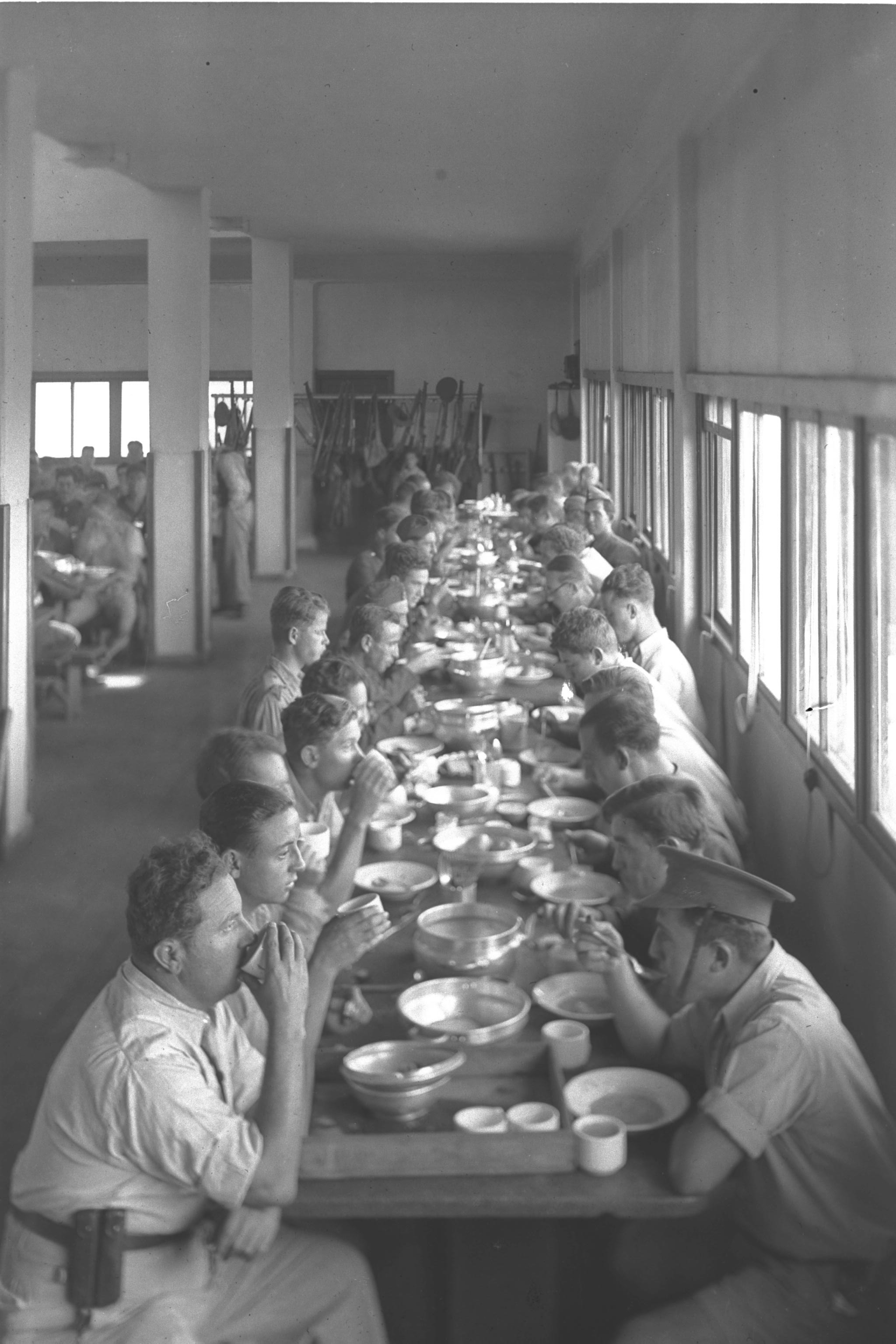 Members of the special night squad eat in the dining hall at Kibbutz Ein Harod. קיבוץ עין חרוד. בצילום, חברי פלוגות הלילה אוכלים בחדר האוכל של הקיבוץ.